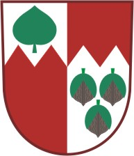 Dřešín